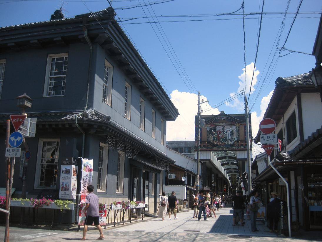 滋賀県長浜市の黒壁スクエアと大手門通り。 Unknown